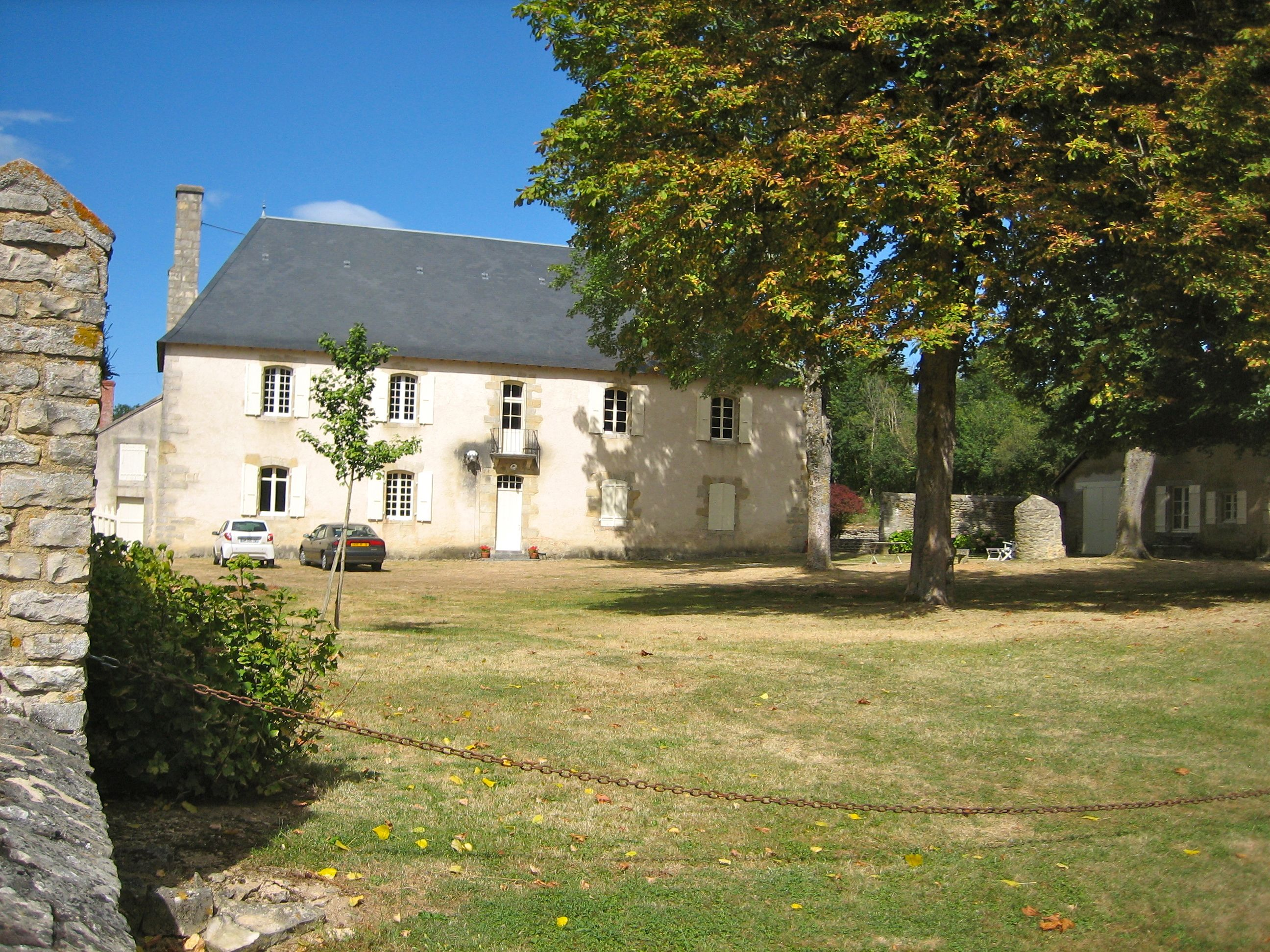 Maison abbatiale de l'abbaye de Varennes, commune de Fougerolles dans l'Indre